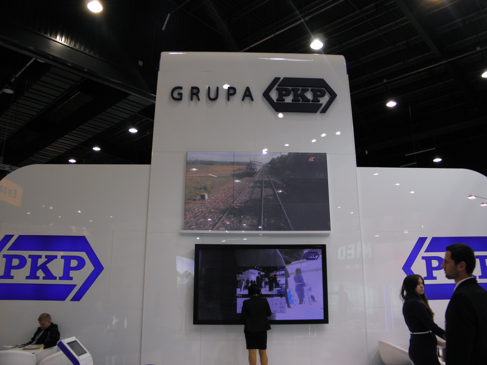 Photo from Trako 2013, Gdańsk/Danzig